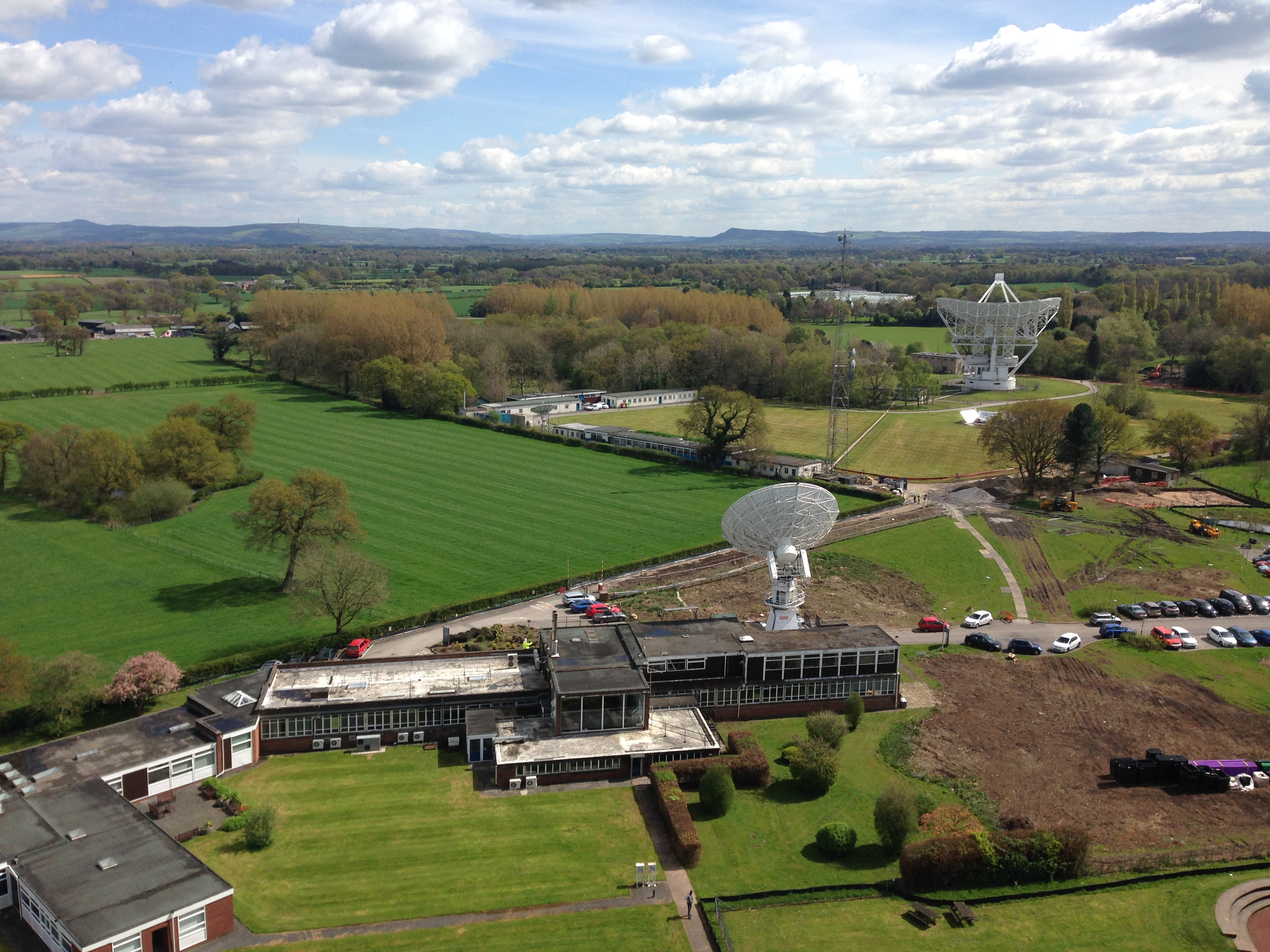 Em primeiro plano uma antena auxiliar e o radiotelescópio Mark II. Foto tirada do topo do Lovell em abril/2017